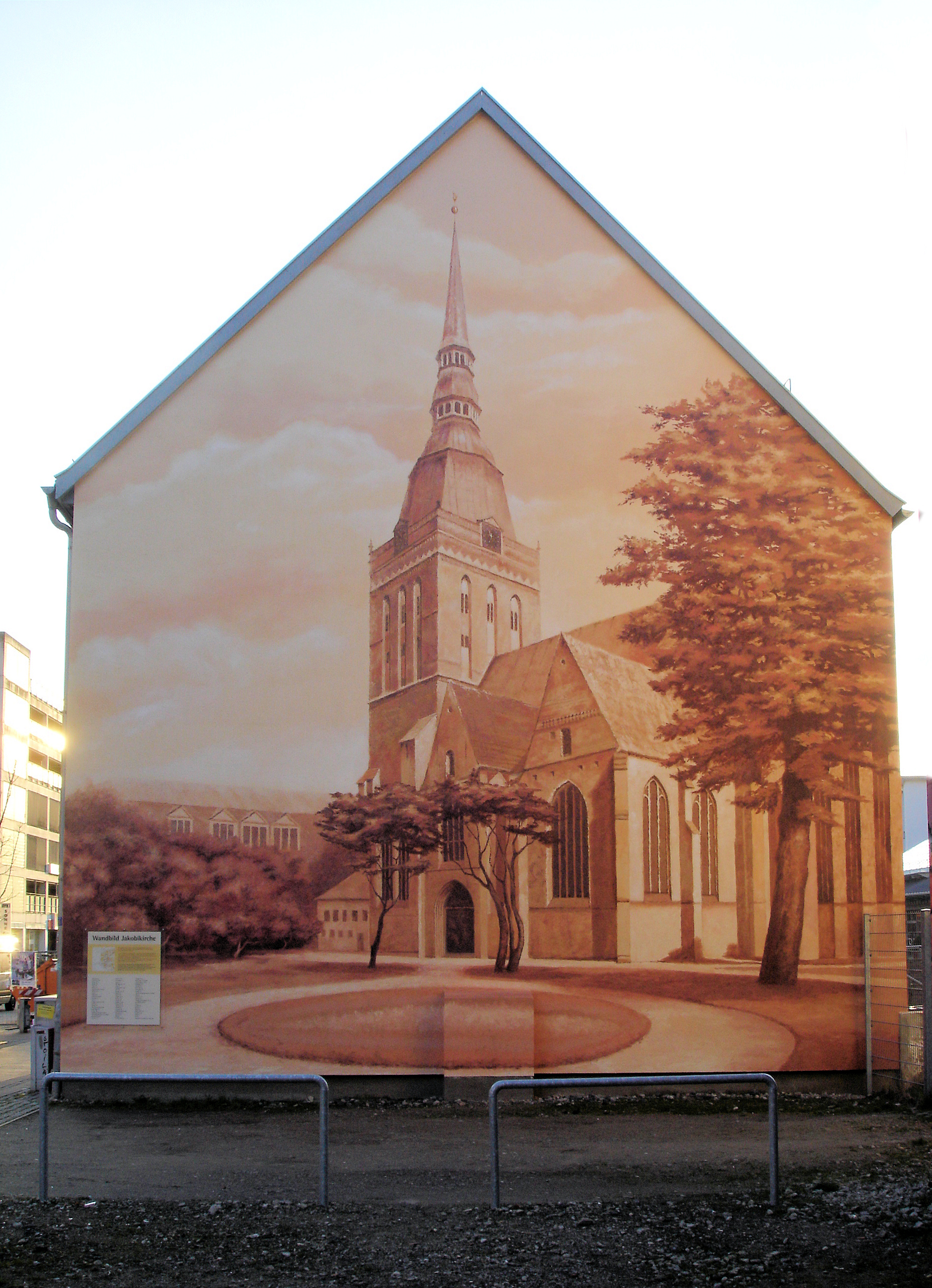 Wandbild St. Jakobi im Friedhofsweg in Rostock von Ina Wilken 2008